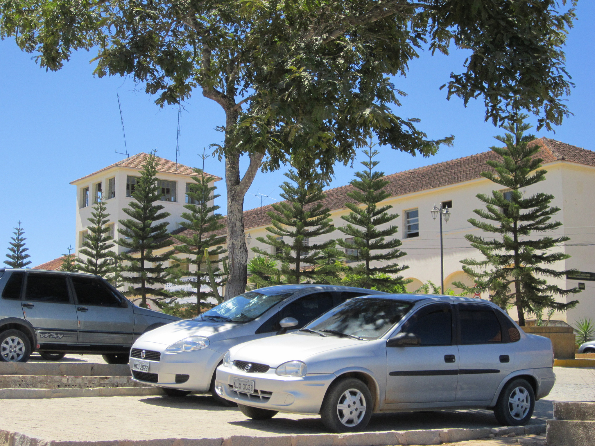 9º Batalhão da Polícia Militar - Garanhuns, Pernambuco, Brasil